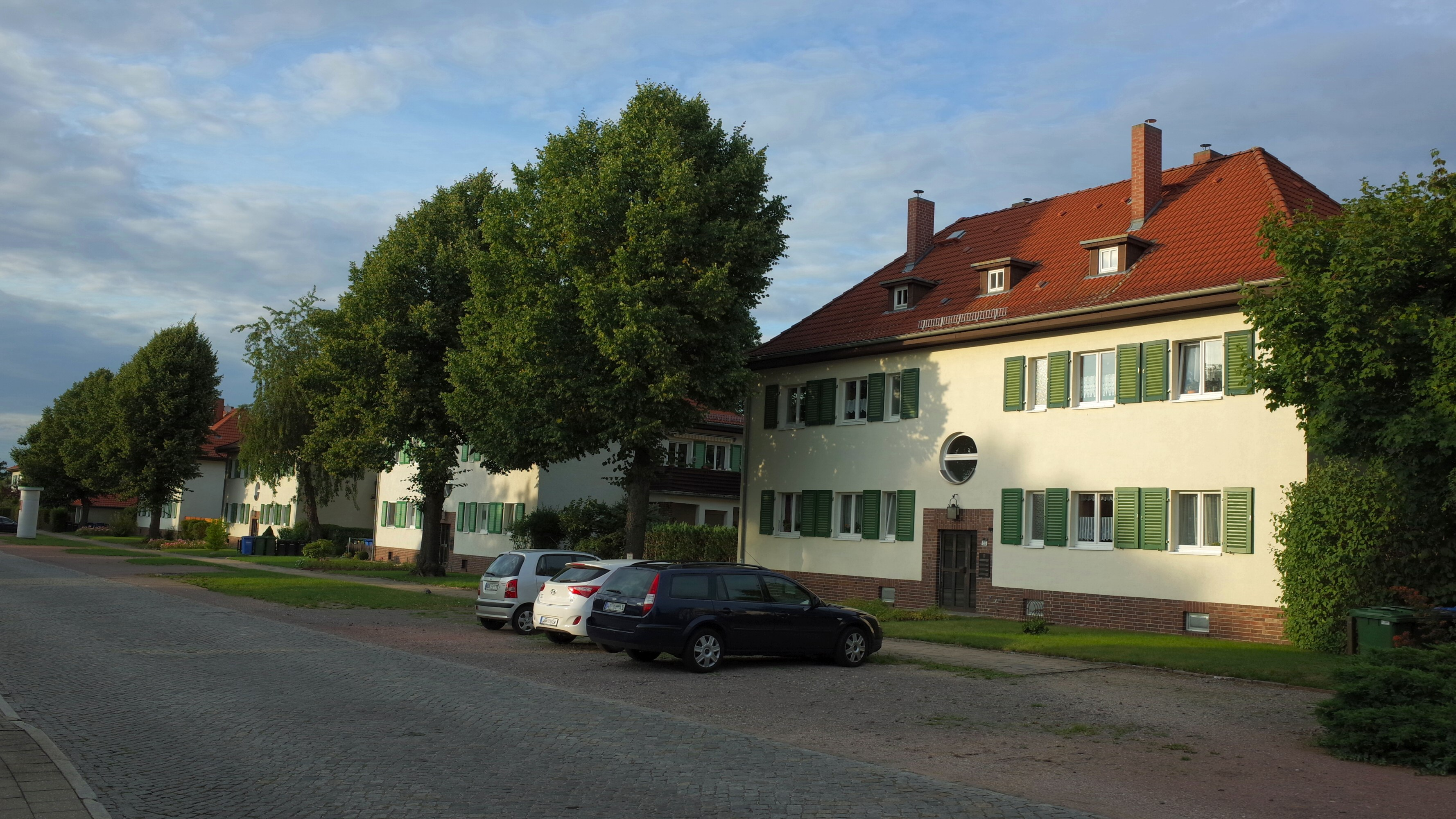 Dessau-Roßlau, Alte Leipziger Straße 59, 61, 63, 65, Siedlung IG-Farben (Baudenkmal im Denkmalverzeichniss Sachsen-Anhalt, Erfassungsnummer: 094 40067 000 000 000 000 [1])